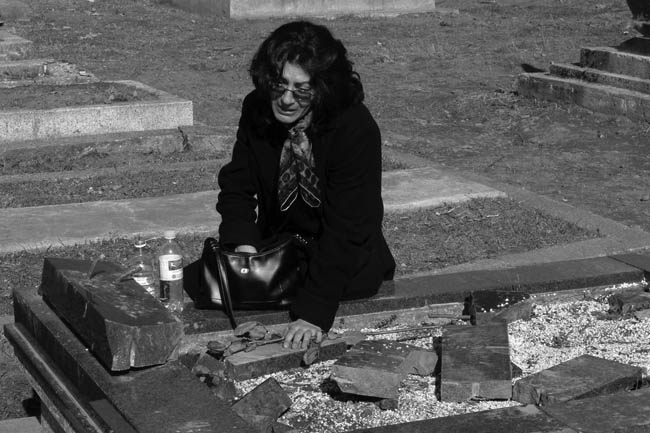 Косово и Метохија: Српскиња на породичном гробу гробља у Ђаковици којег су албански терористи порушили а гробнице оскрнавили. Фотографије из пројекта "Корени душе". Фото:Дарко Дозет